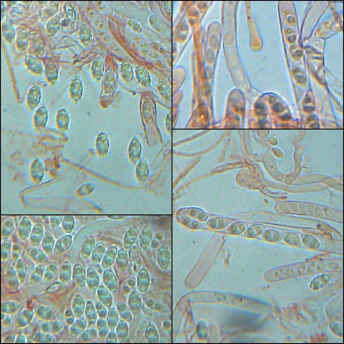 Aleuria aurantia (Pers.) Fuckel